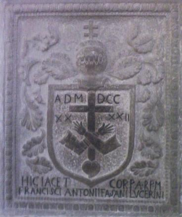 Simone De Troia, Lapide dell'antico sepolcro di Padre Maestro Licensing Categoria:Lucera